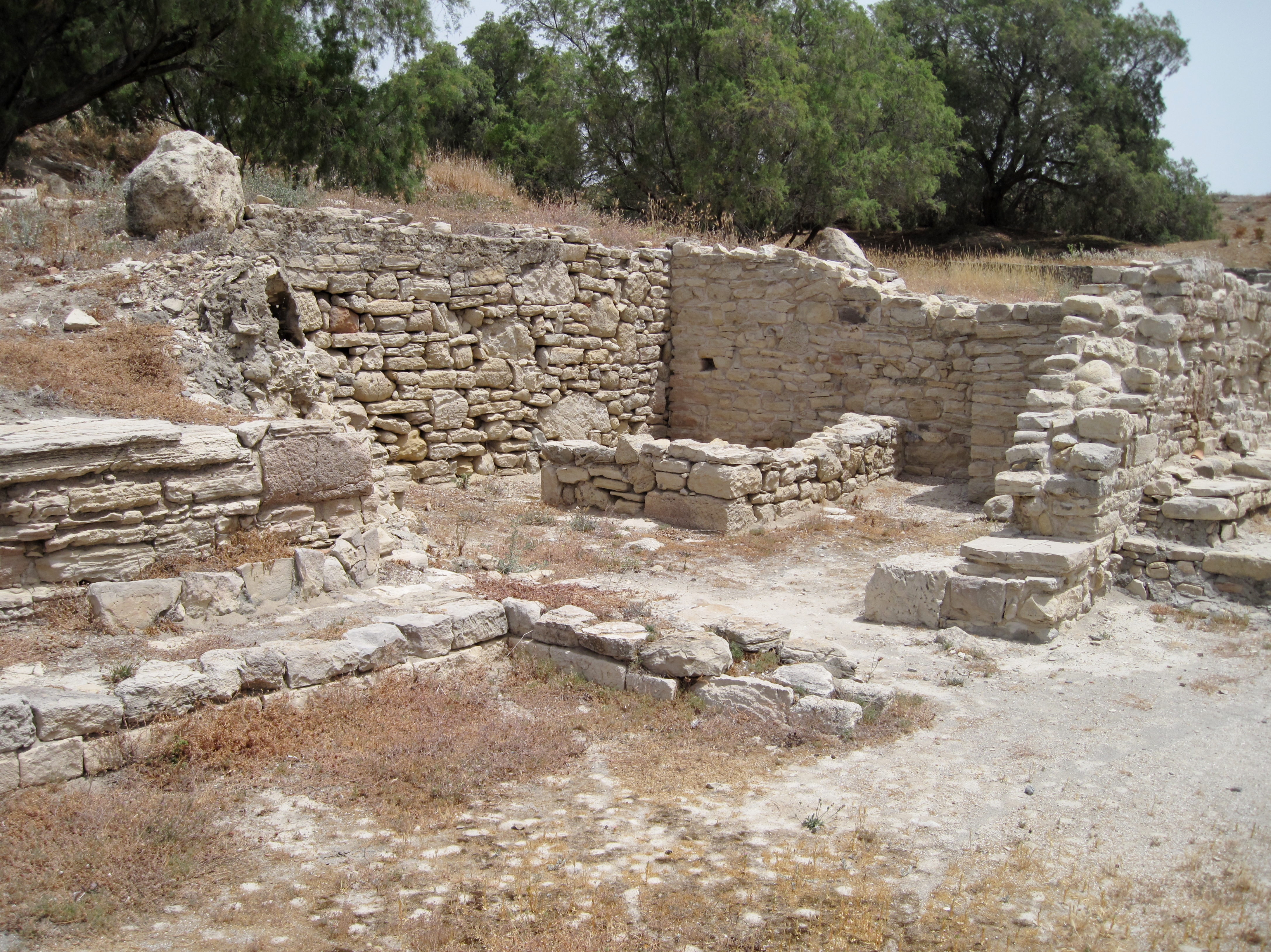 Ausgrabungsstätte der antiken Küstensiedlung Komos (auch Kommos), Gemeinde Tymbaki, Präfektur Iraklio, Kreta, Griechenland